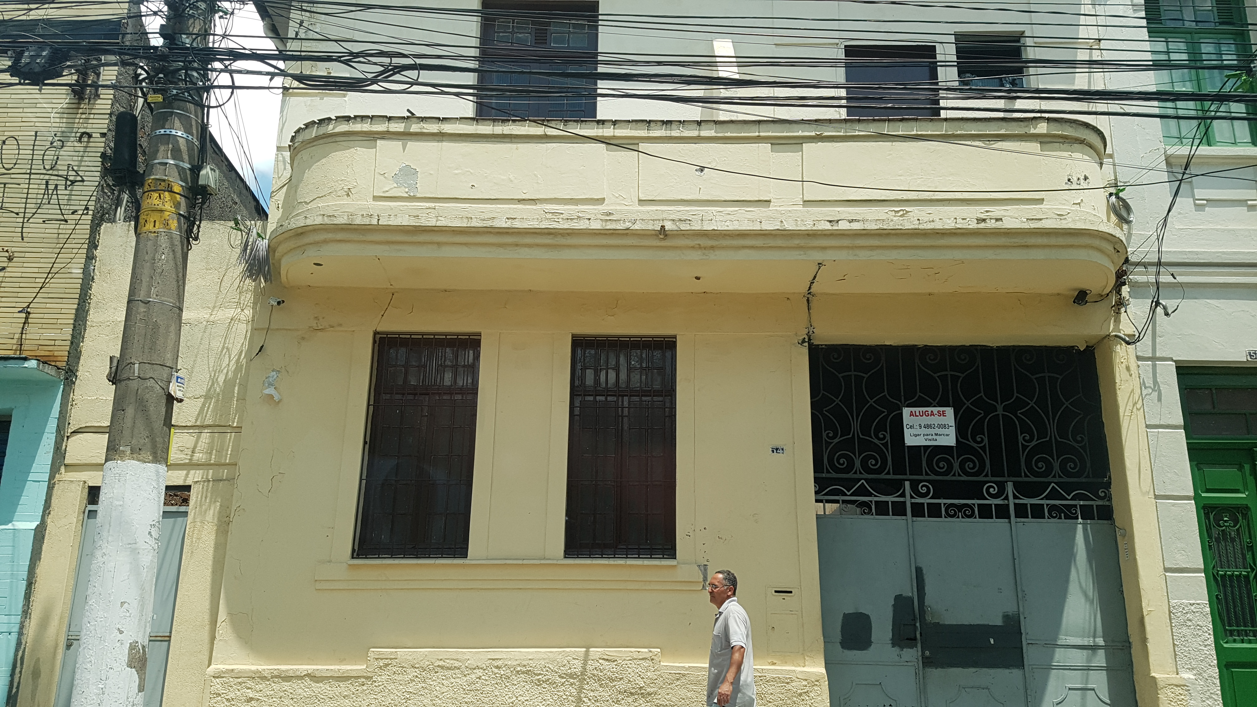 Casa de Christian Ludwig Enderess - Rua São Leopoldo